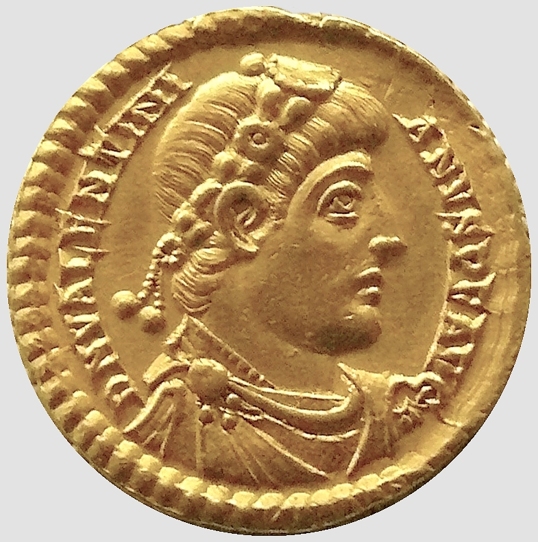 Solidus d'or de Valentinien Ier (364-375) atelier de Trèves - Musée d"archéologie nationale de Saint-Germain-en-Laye, Inv n° 1499 N